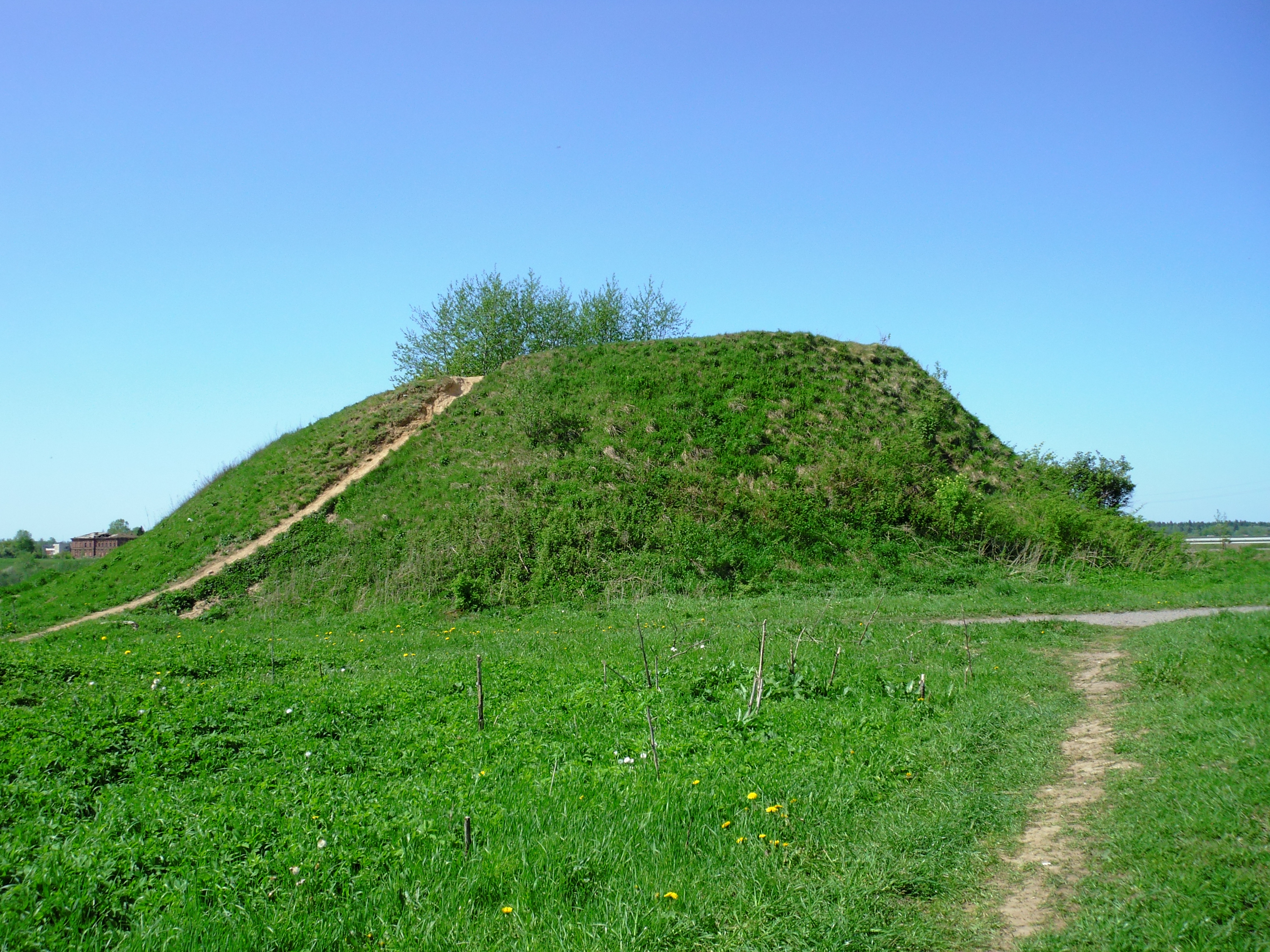 Старая Ладога. Олегова могила